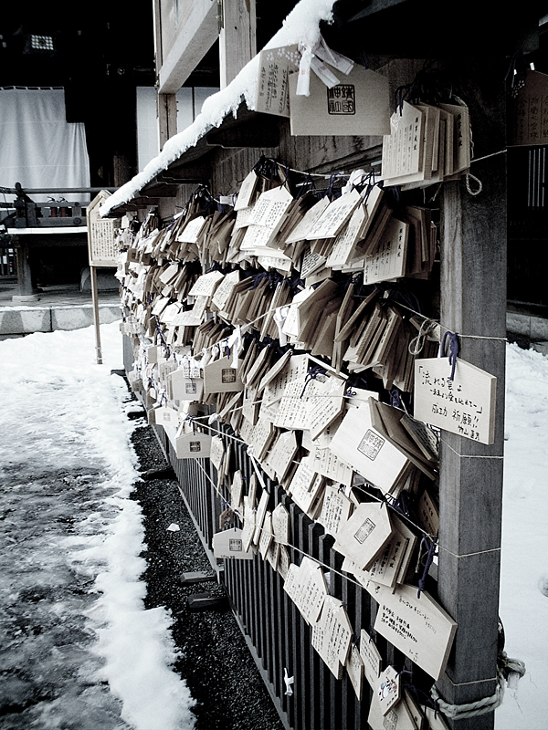 Ema at Meiji shrine